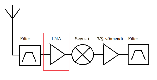 Vastuvõtja ahela osa, kus on näha LNA asetus ahela eesotsas. Antud juhul on enne LNA-d eelselektiivsuse tagamiseks ka filter.